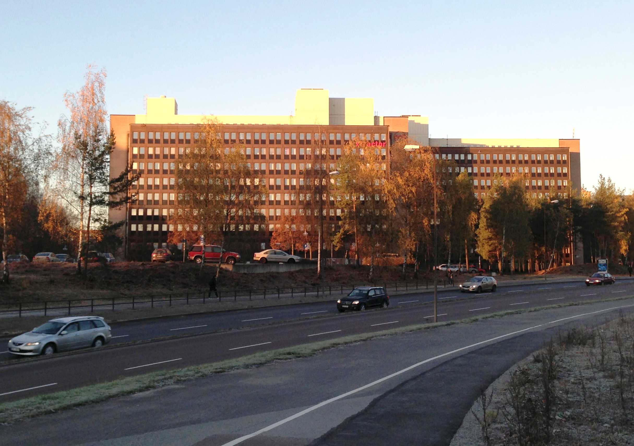 Albydal 3, Solna Access. Sundbybergsvägen 1. Byggnadsår 1979 för Esselte AB. Arkitekter Kjessler & Mannerstråle AB